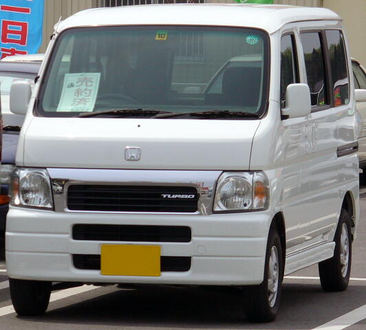 2代目ホンダ・バモス（前期型）